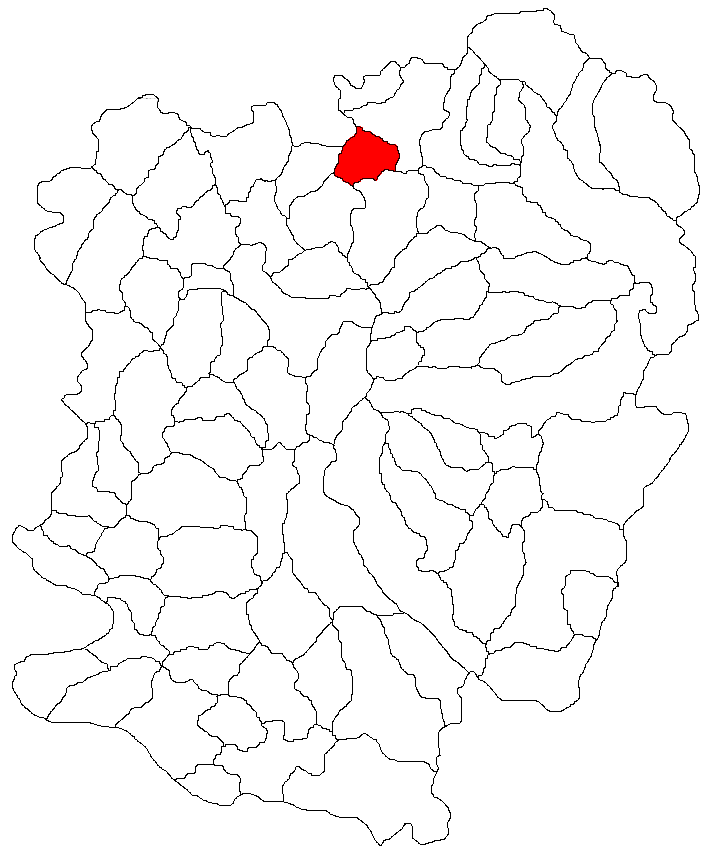 Categorie:Hărţi ale judeţului Caraş-Severin